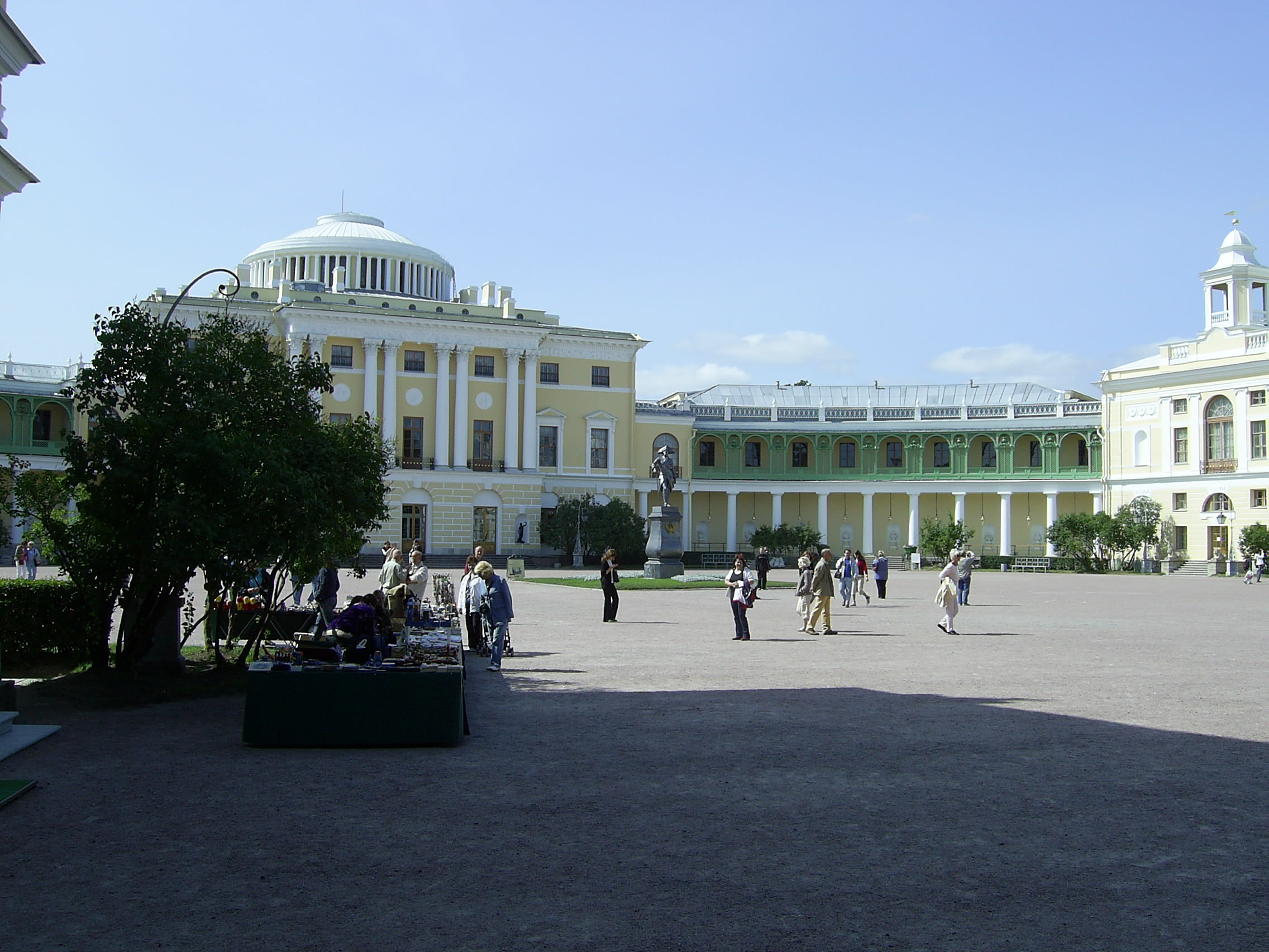 Palace in Pavlovsk